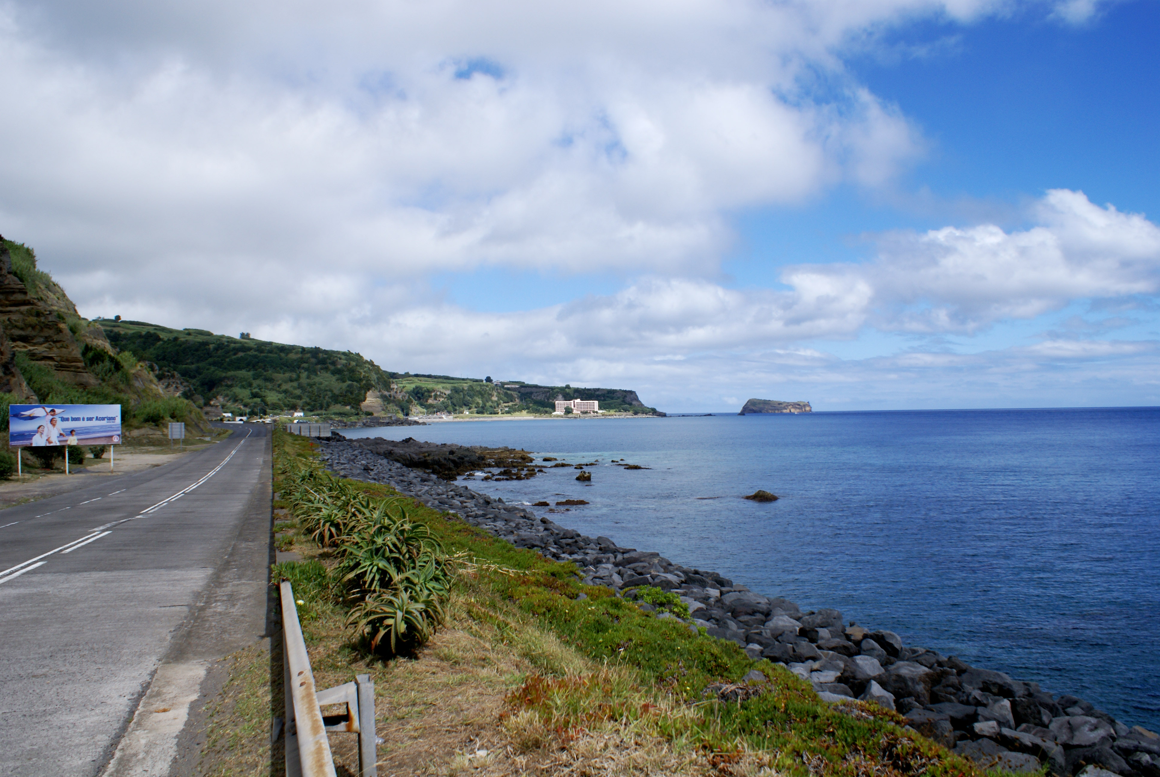 Praia dos Trinta Reis com o ilhéu de Vila Franca ao fundo, Água de Alto, ilha de São Miguel, Açores